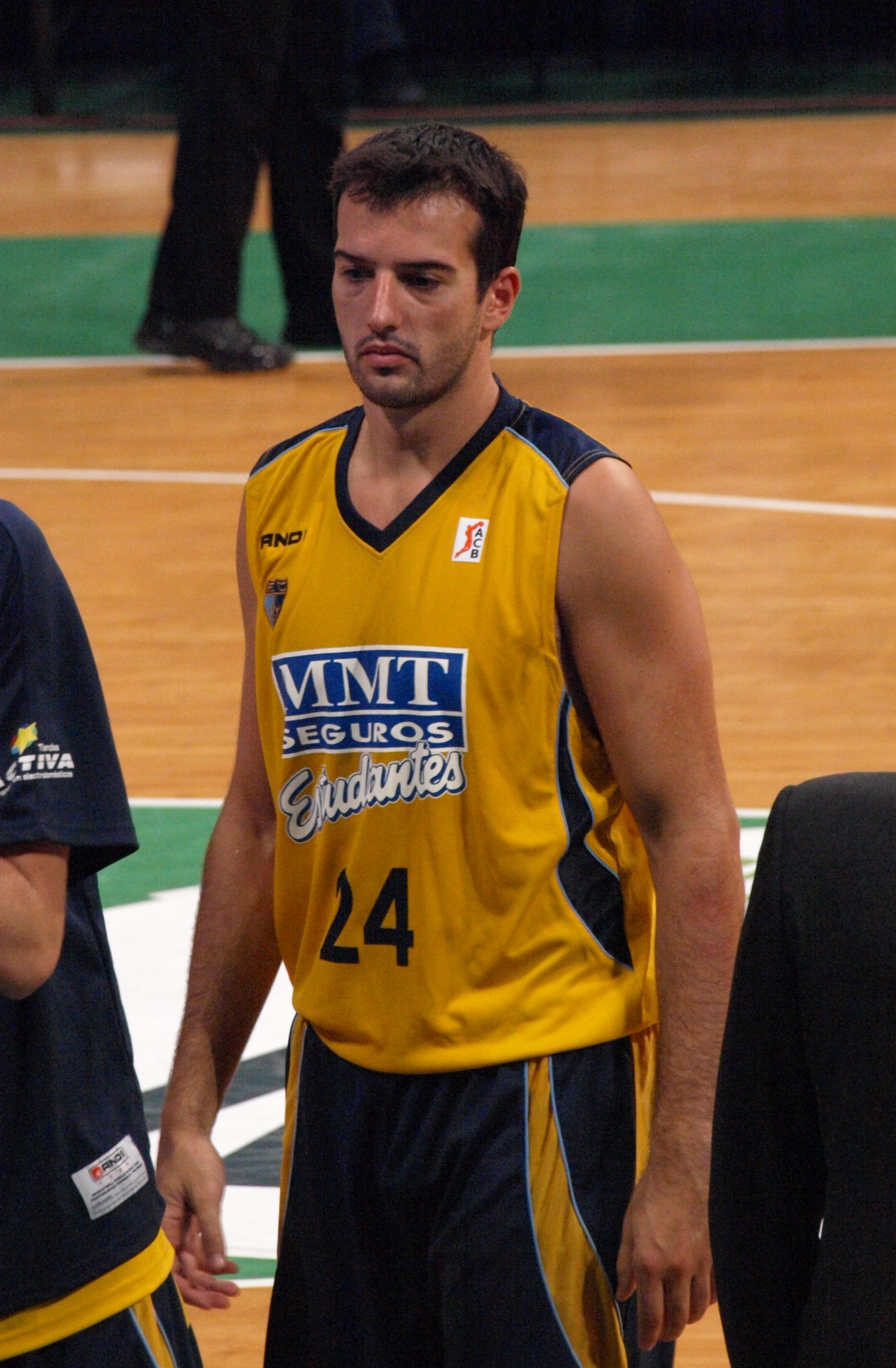 Oriol Junyent durante la disputa del partido de la segunda jornada de la liga ACB 2008-09 que enfrentó al Estudiantes y al DKV Joventut en el Olímpico de Badalona.